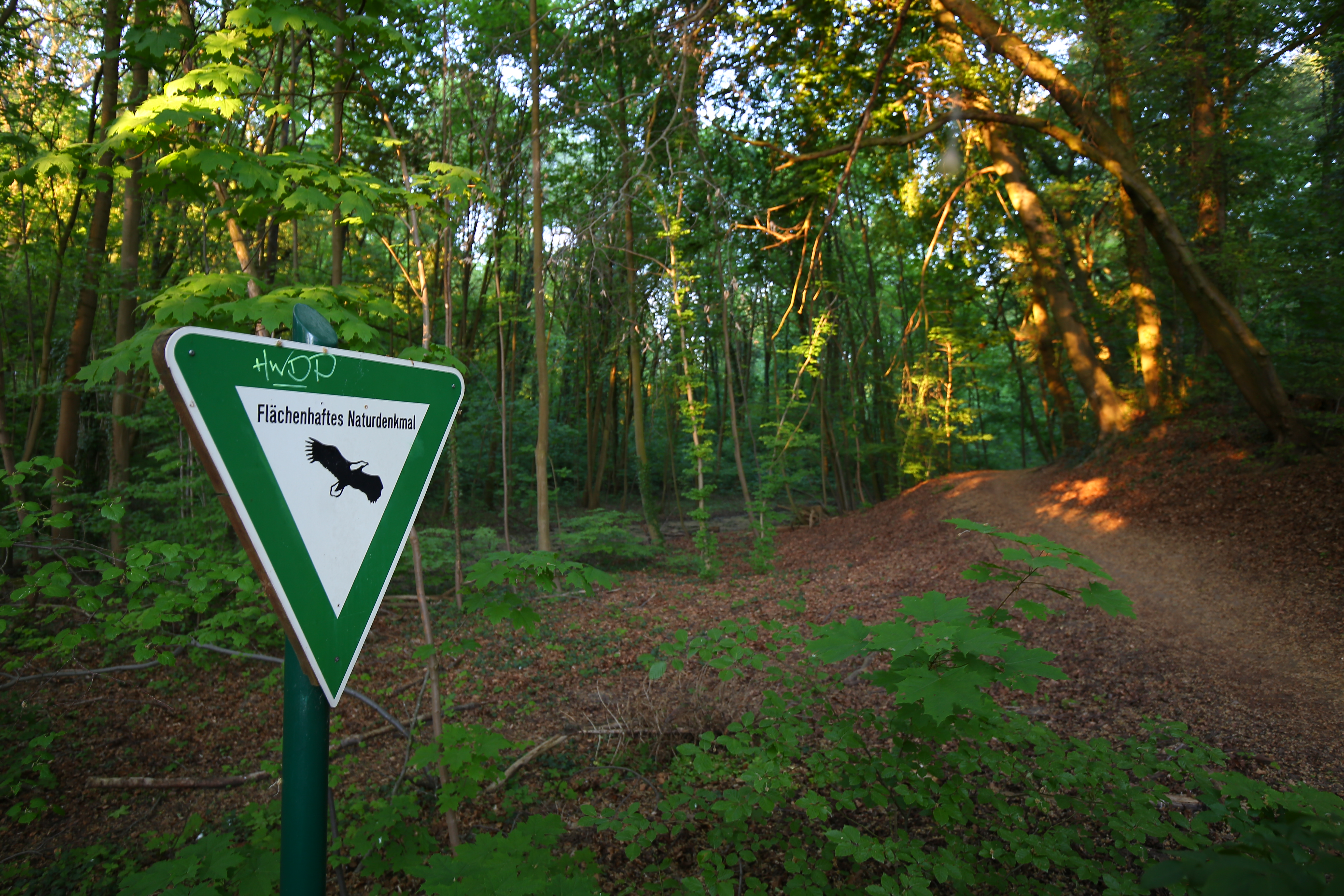 Schild „Flächenhaftes Naturdenkmal“ im Wald in Darmstadt-Bessungen, Fußweg zum Bessunger Forellenteich (Naturdenkmal)